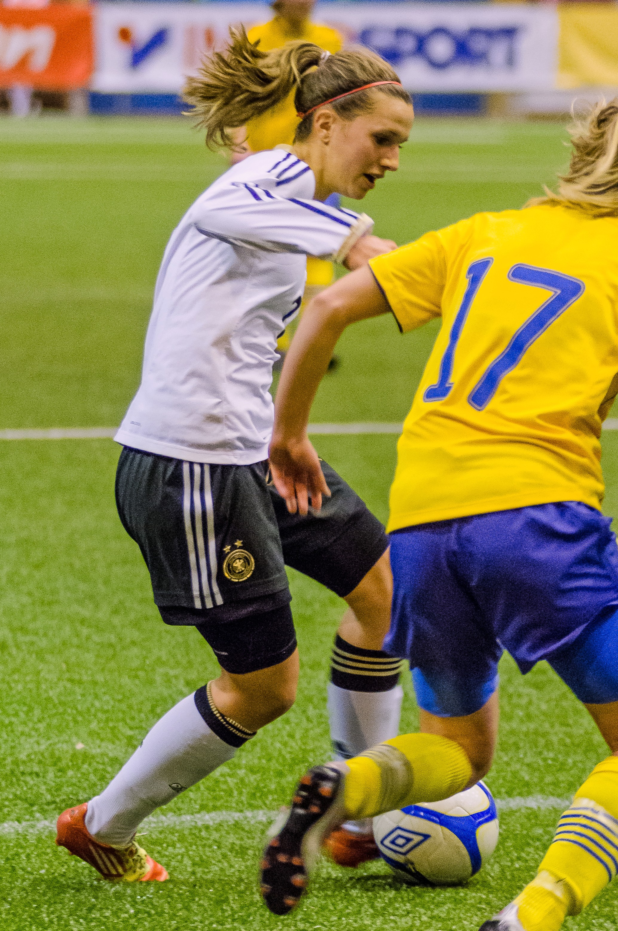 Annabel Jäger spelar F18-landskamp mellan Sverige och Tyskland i Växjö Tipshall, 21/11 2012.